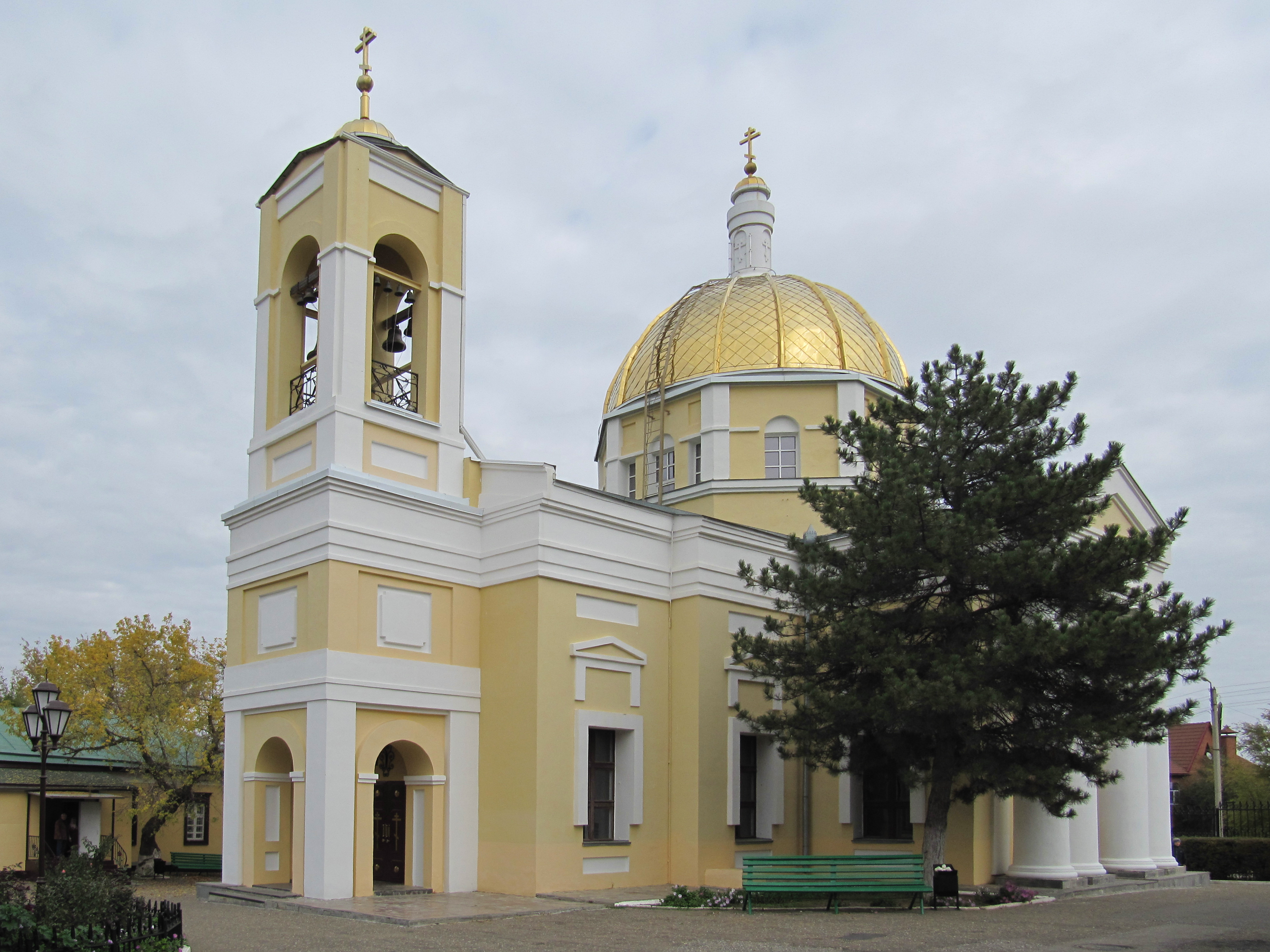 Казанский собор, Элиста, Калмыкия